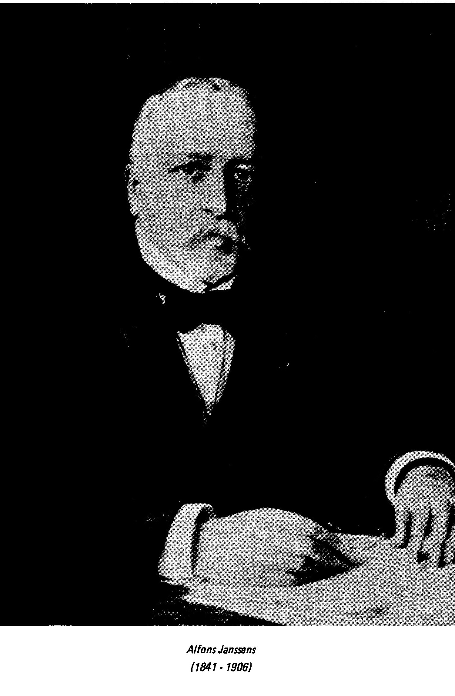 foto